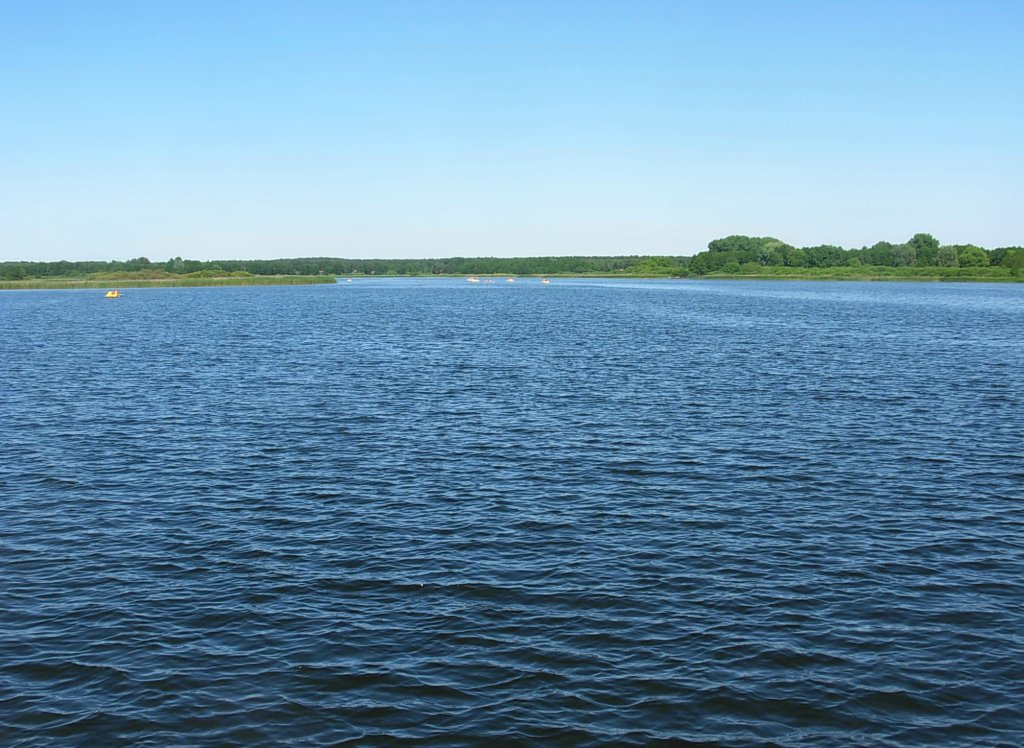 Jezioro Jezuickie k. Bydgoszczy